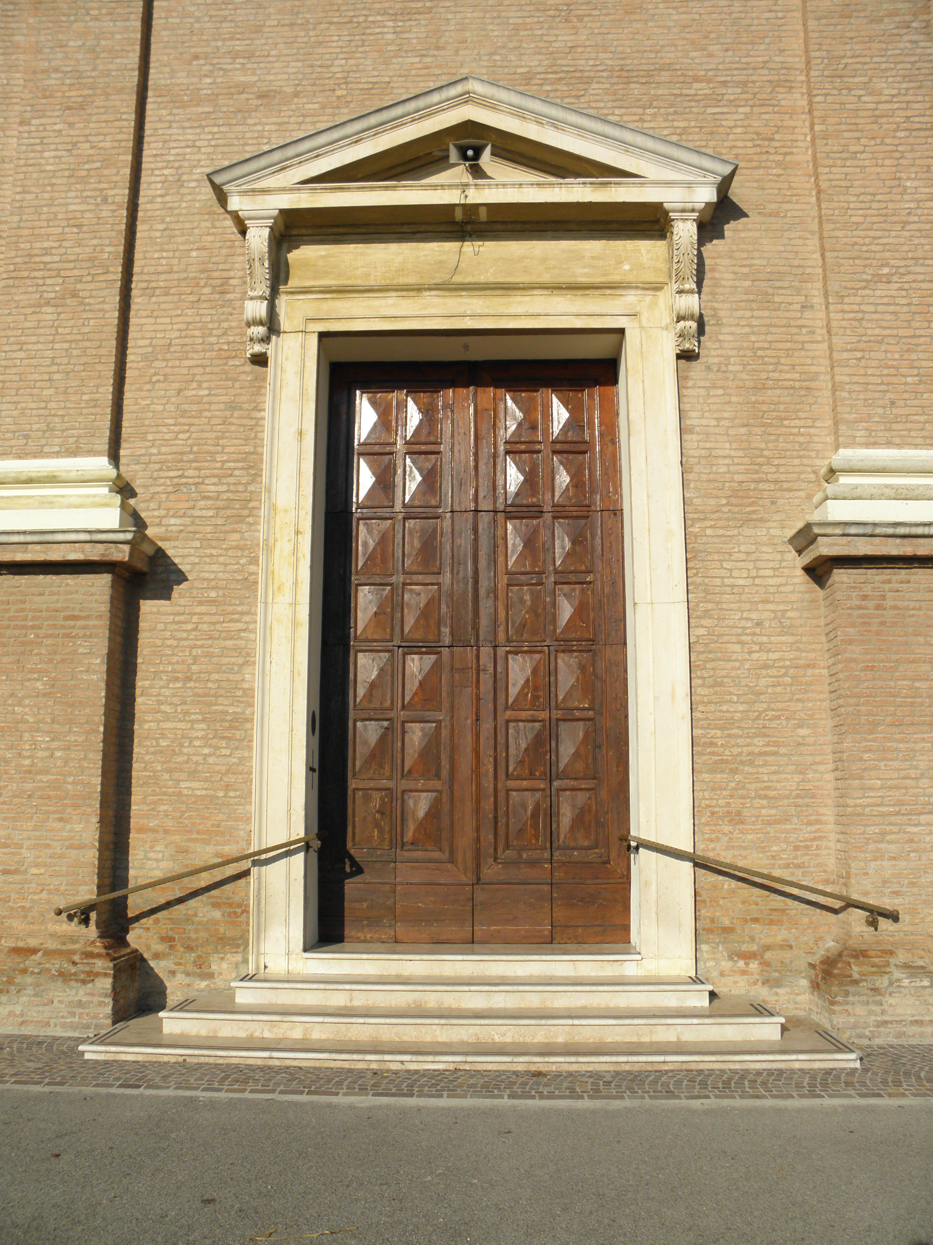 Cologna, frazione di Berra: il portale della chiesa parrocchiale di Santa Margherita Vergine e Martire (XII secolo).